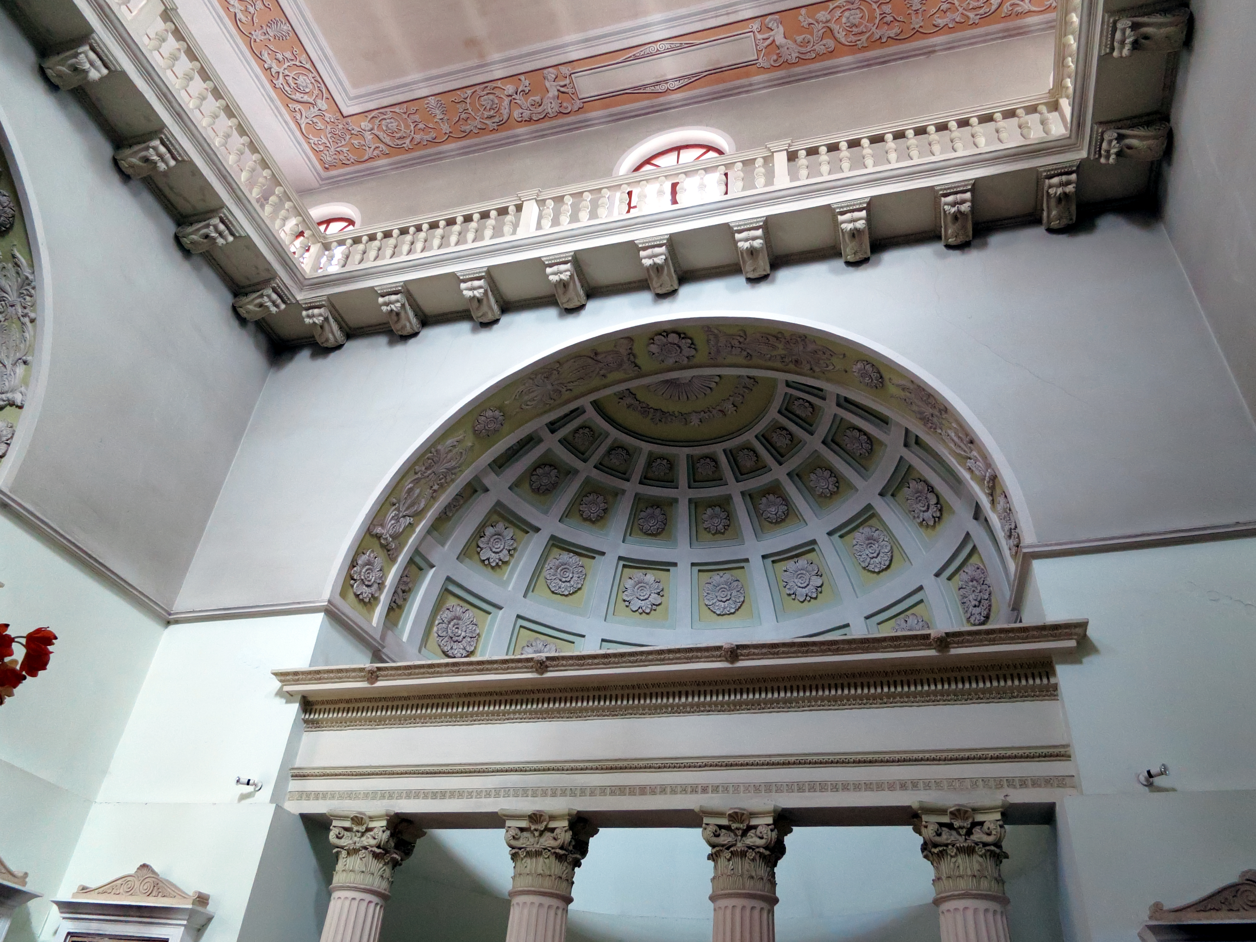 Busko-Zdrój, łazienki, obecnie sanatorium MARCONI (dec. budynki zakładu zdrojowego), 1836 r.